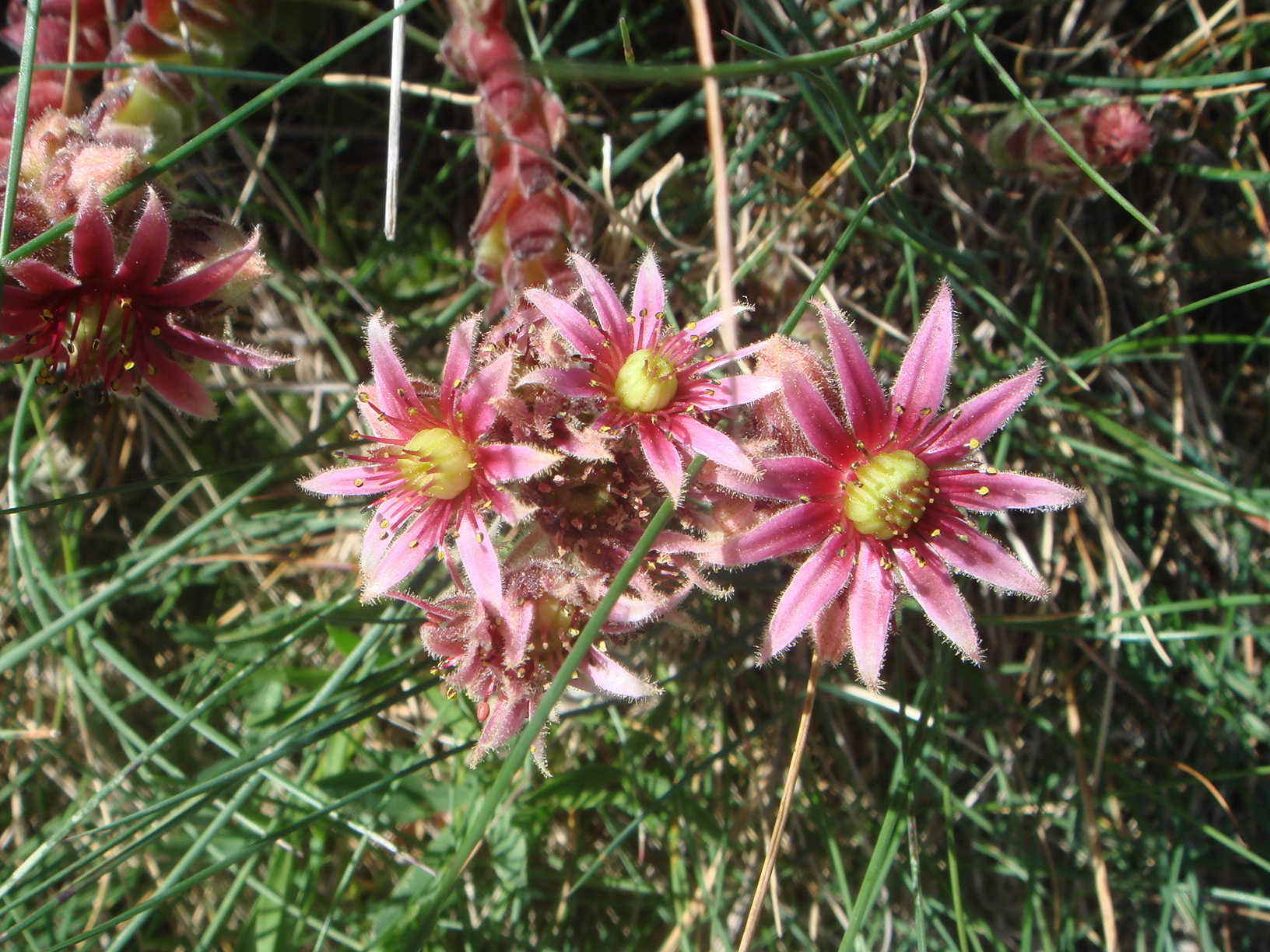 Sempervivum montanum, Lago de Cap de Long, Reserva natural de Néouvielle, Altos Pirineos, Francia.